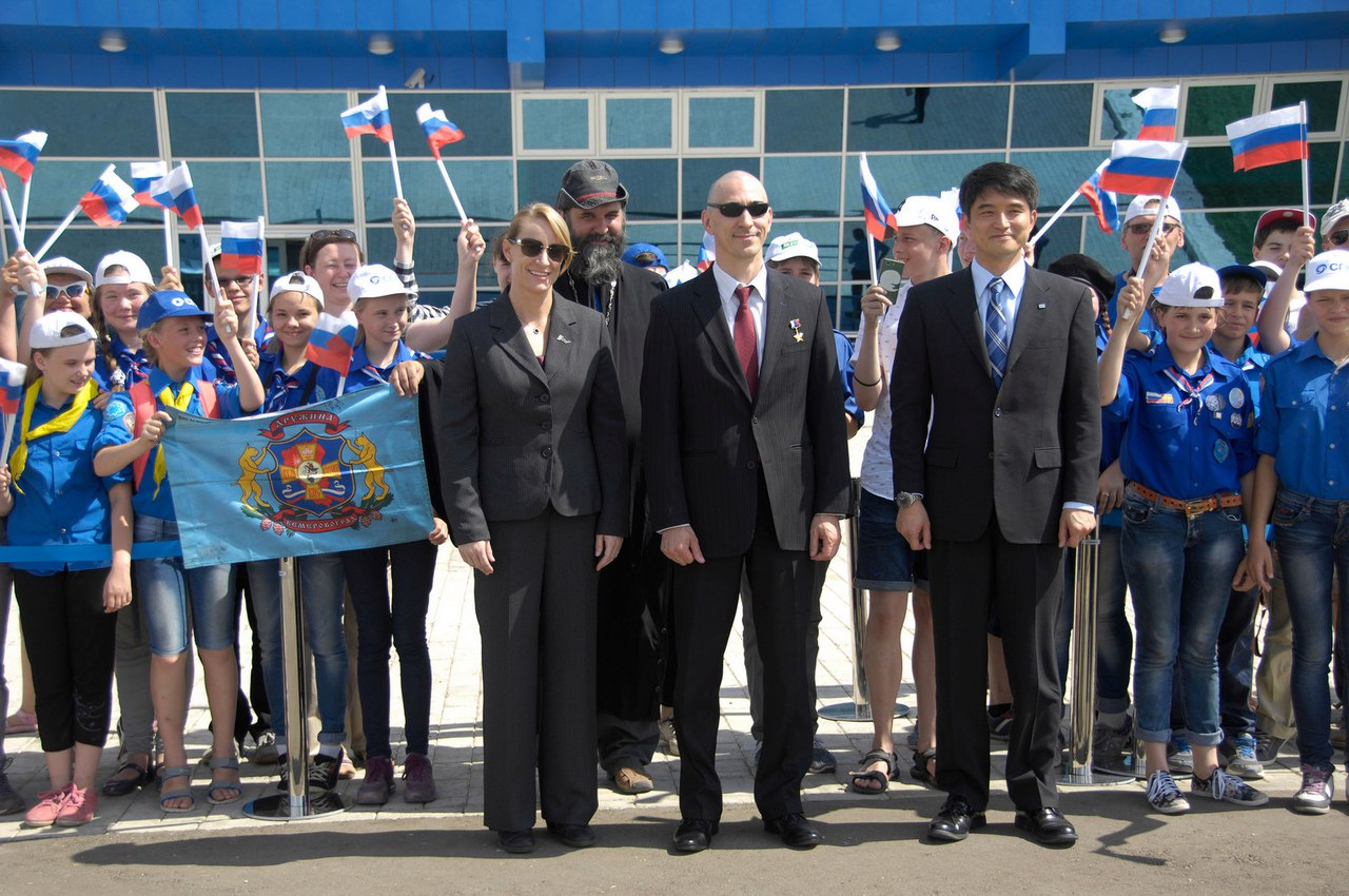 Основной экипаж космического корабля "Союз МС-01" фотографируется в аэропорту Байконура с детьми из Братства православных следопытов